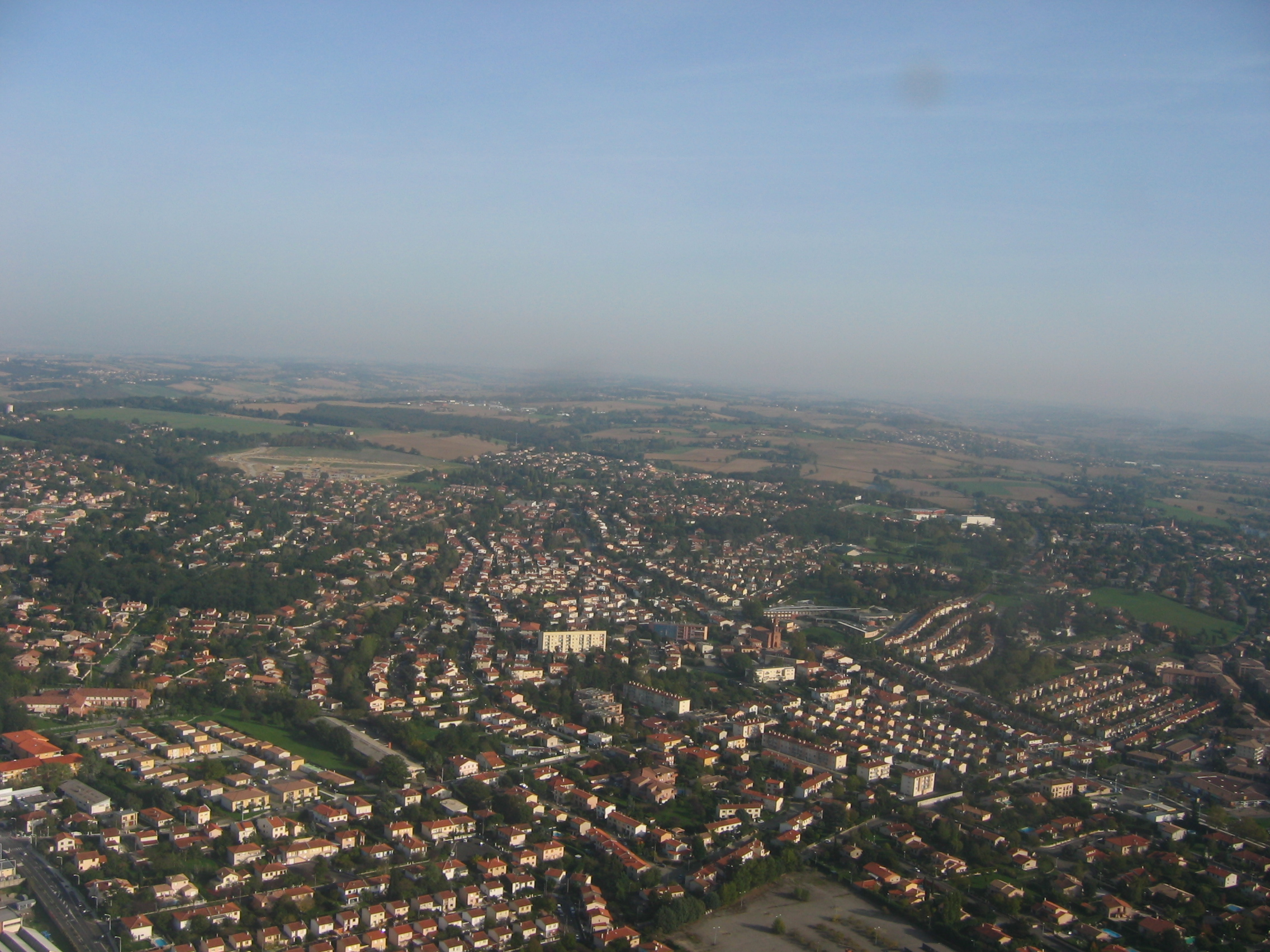 Balma between Avenue Victor Hugo and rue de la pépinière